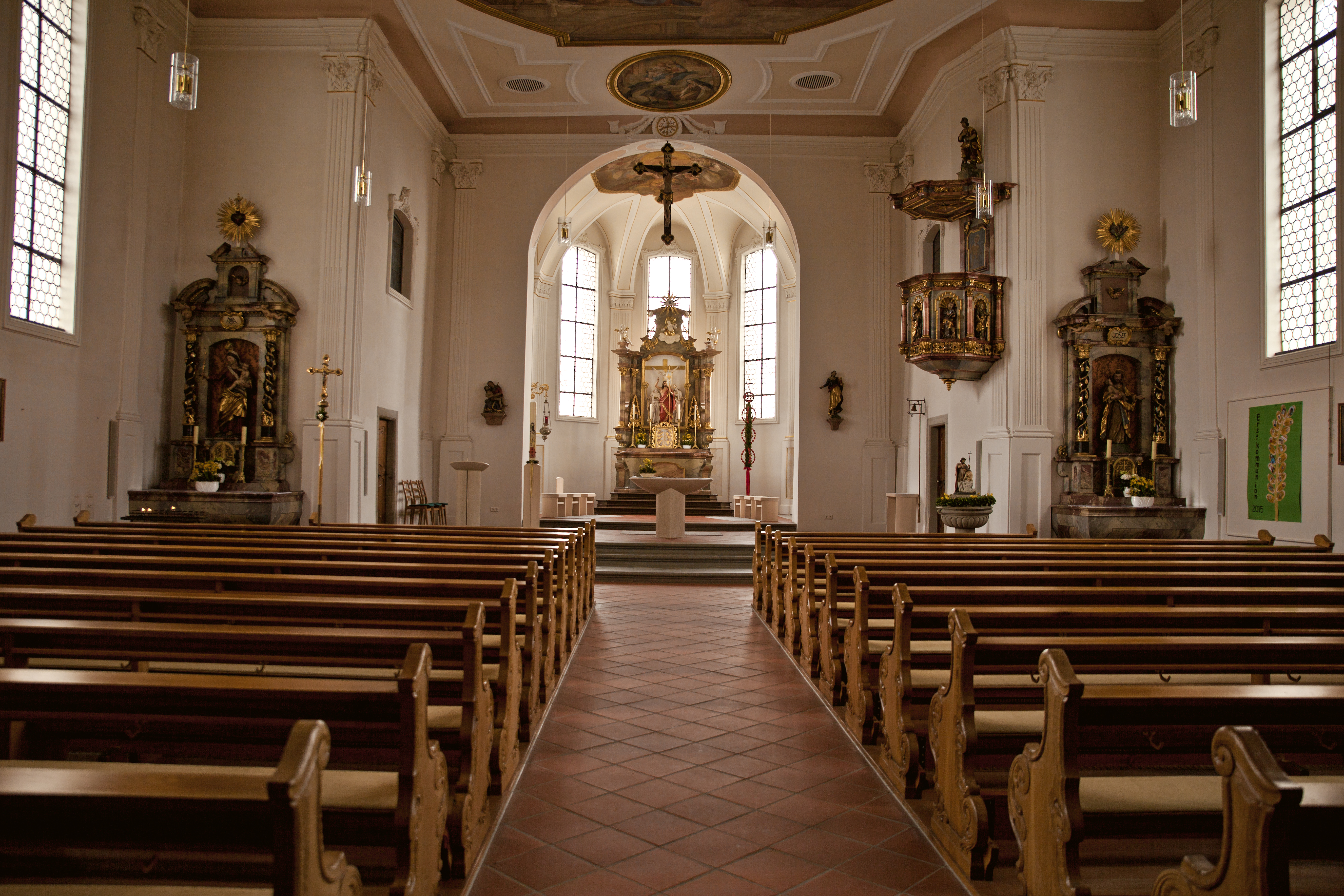 The Baroque Church of St. Ulrich and Magnus in Bodnegg Die Barockkirche St. Ulrich und Magnus in Bodnegg L'église baroque de Saint-Ulrich et Magnus dans Bodnegg